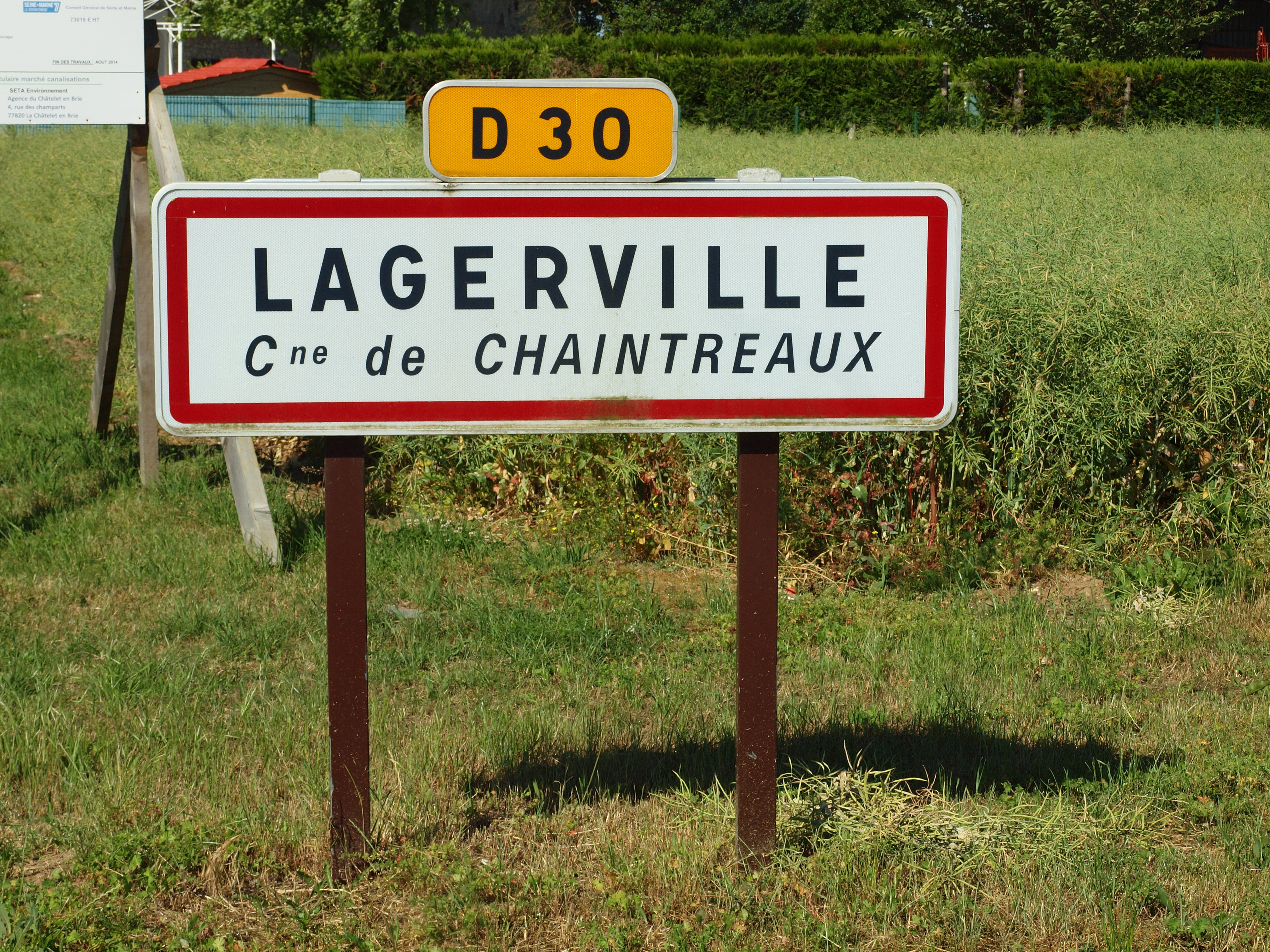 Lagerville (Commune de Chaintreaux, Seine-et-Marne, France) ; panneau d'agglomération.